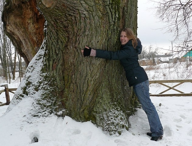 Фото путешествия по Беларуси.